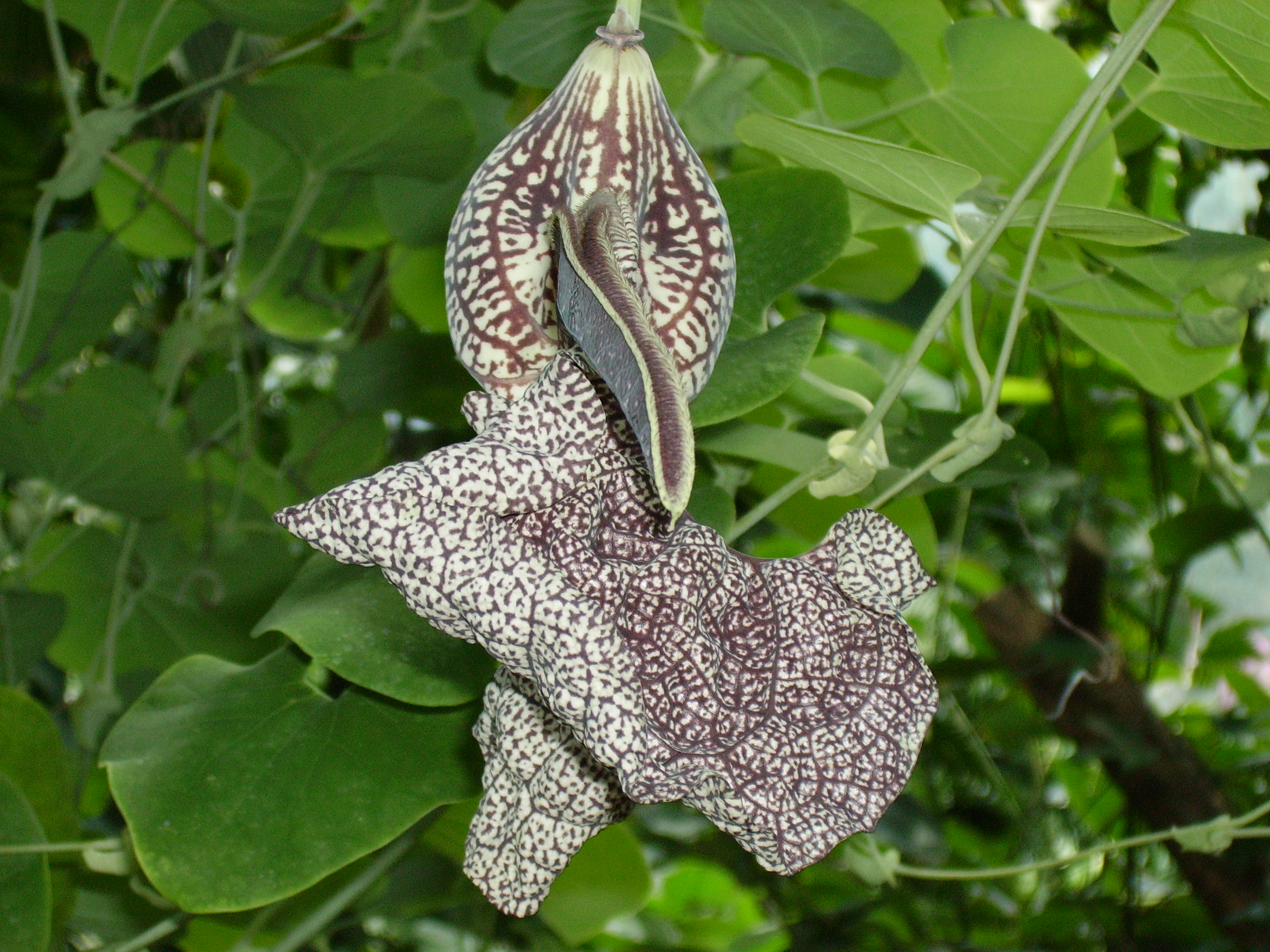 Aristolochia labiata from Palmen Garten (Frankfurt-Germany).